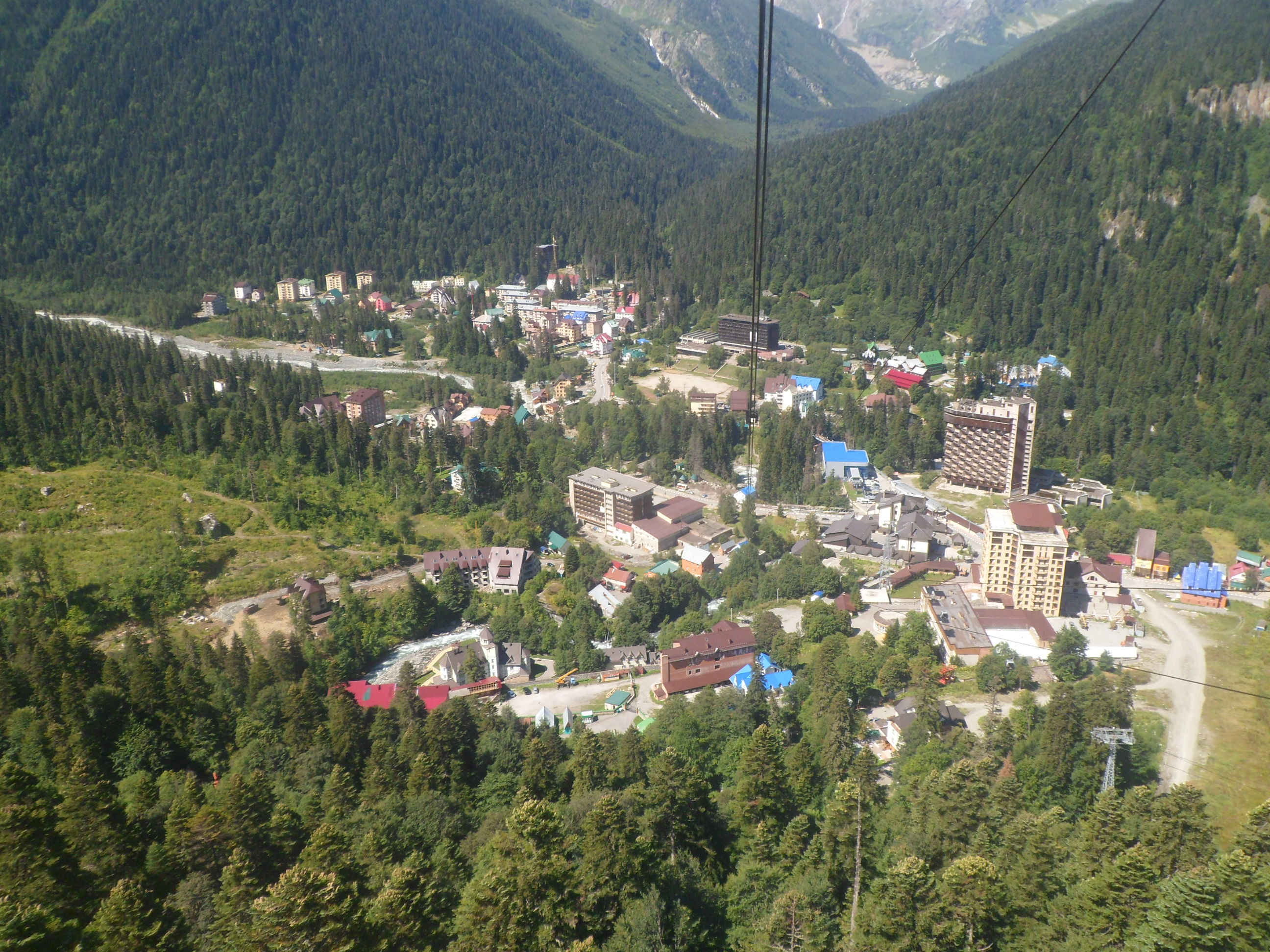 Поселок Домбай с подъёмника.